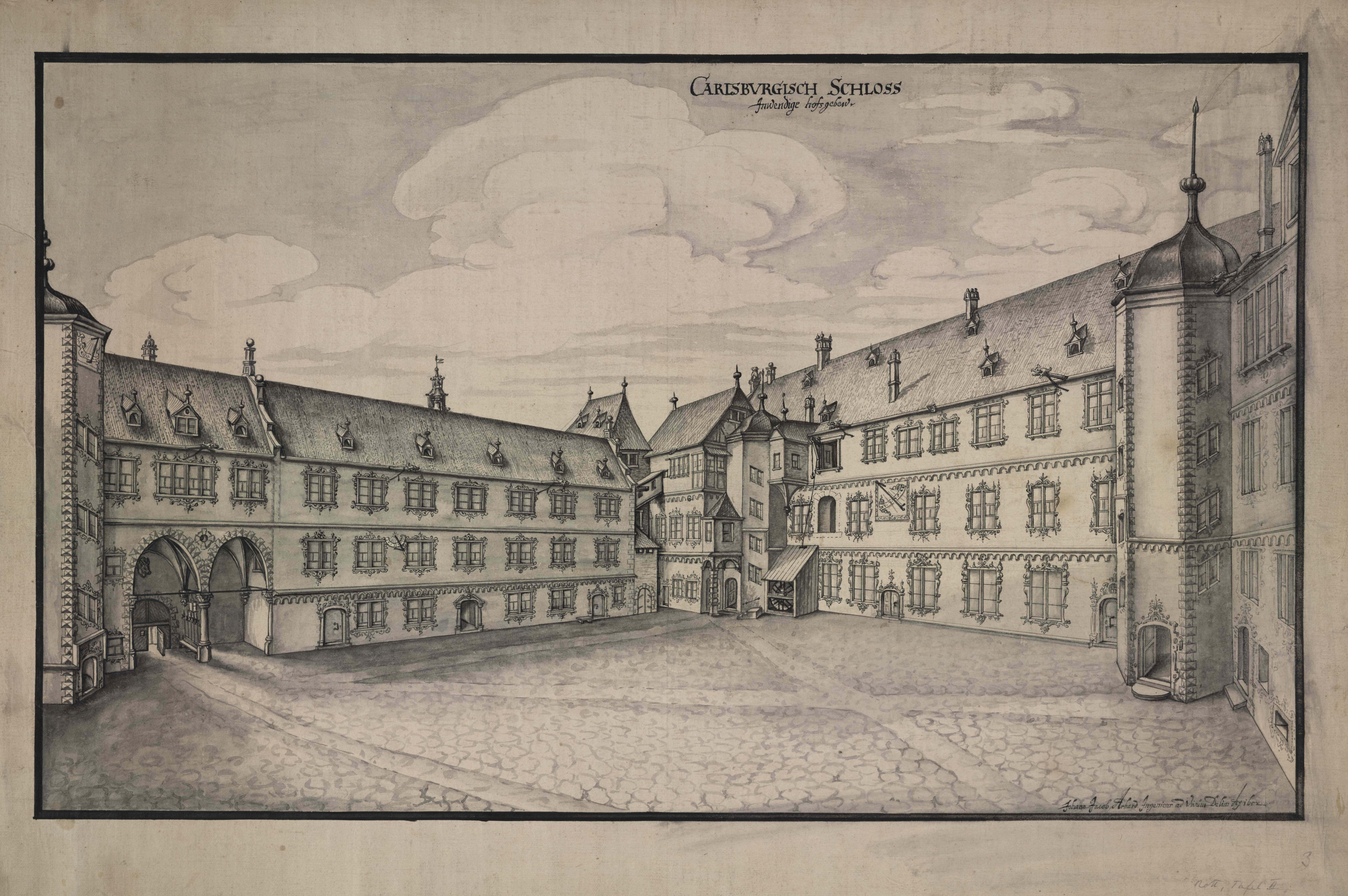 Hofansicht der Karlsburg in Durlach von J. J. Arhardt, 1652 (GLAK Hfk Planbände 28 Nr. 3)